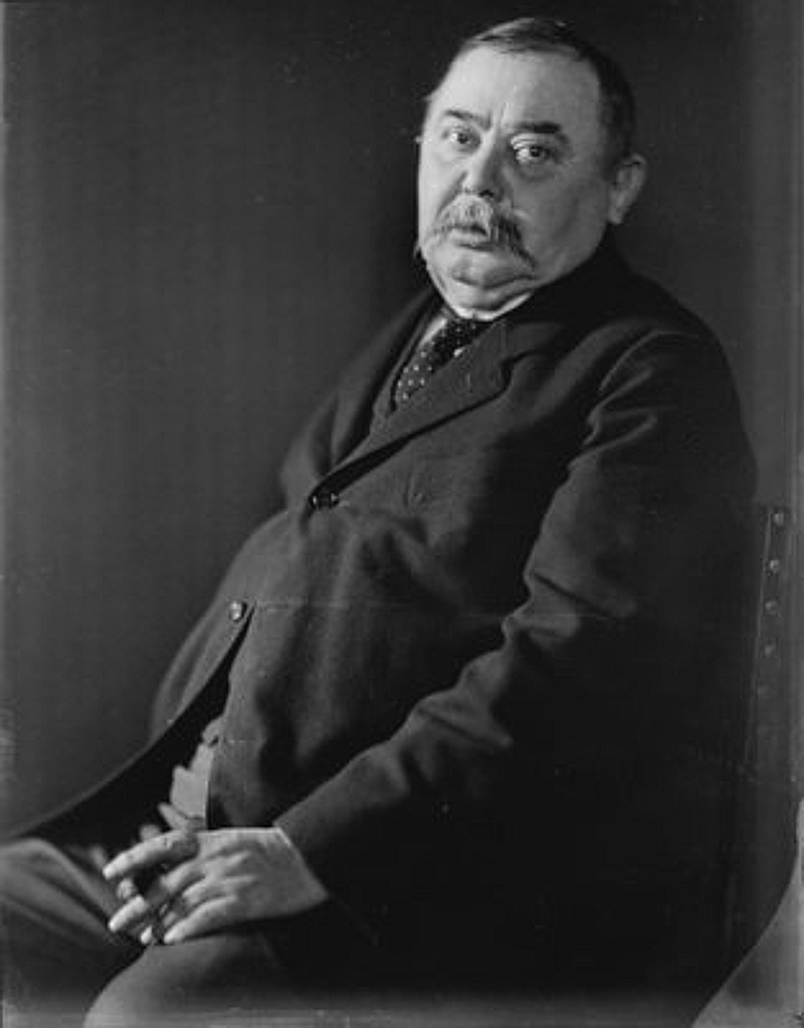 Kiscsoltói Mikszáth Kálmán (Szklabonya, 1847. január 16. – Budapest, Józsefváros, 1910. május 28.) magyar író, újságíró, szerkesztő, országgyűlési képviselő, a Magyar Tudományos Akadémia levelező tagja, a Kisfaludy Társaság és Petőfi Társaság rendes tagja, a Budapesti Egyetem tiszteletbeli bölcsészdoktora